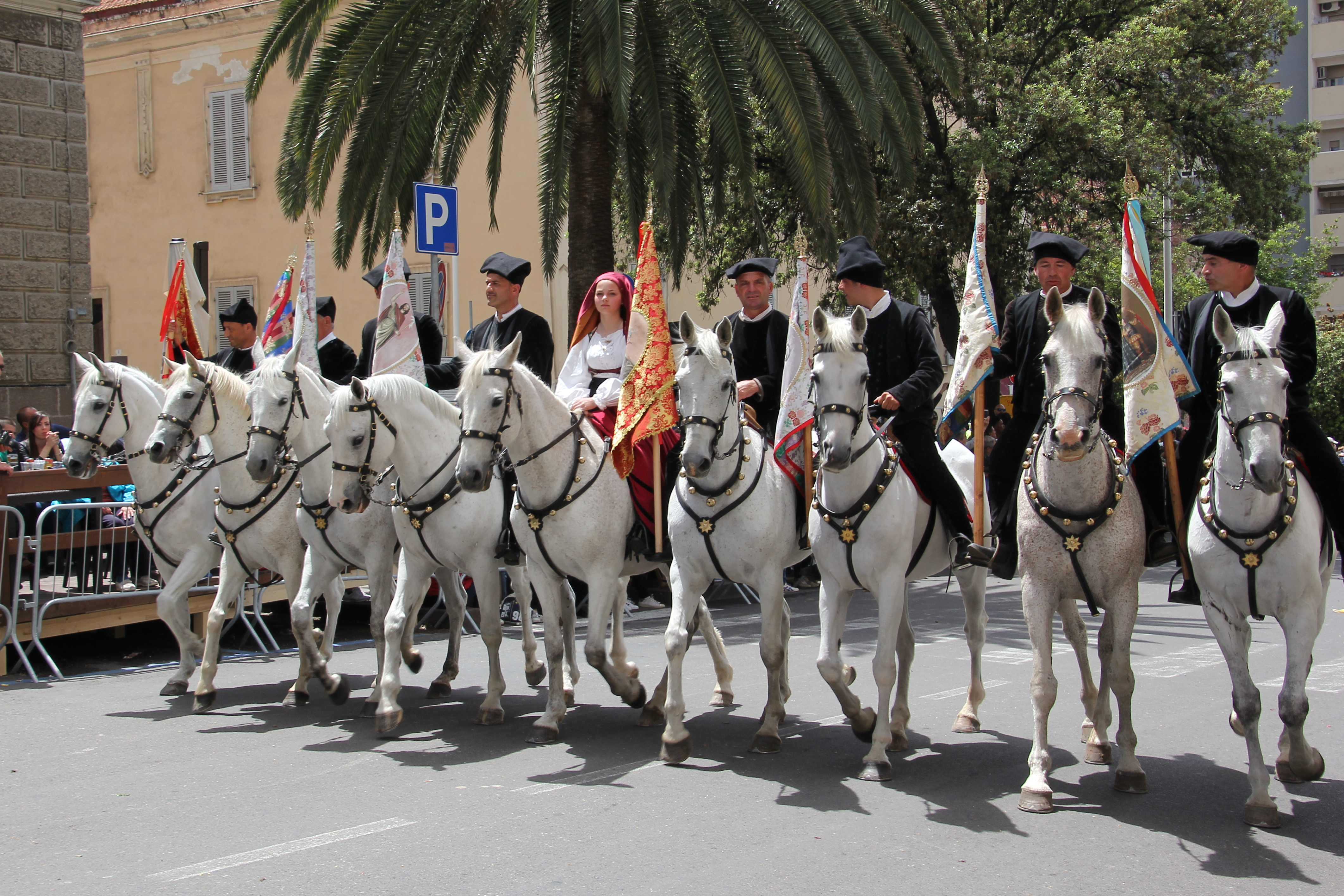 Cavalcata sarda 2018, Sassari, Sardegna , Italy